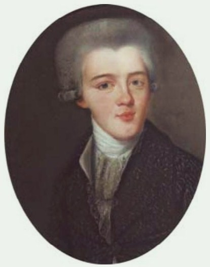 Петр Алексеевич Ермолов (1746-1832), директор Орловского тюремного комитета правитель канцелярии ген-прокурора гр. А. Н. Самойлова.